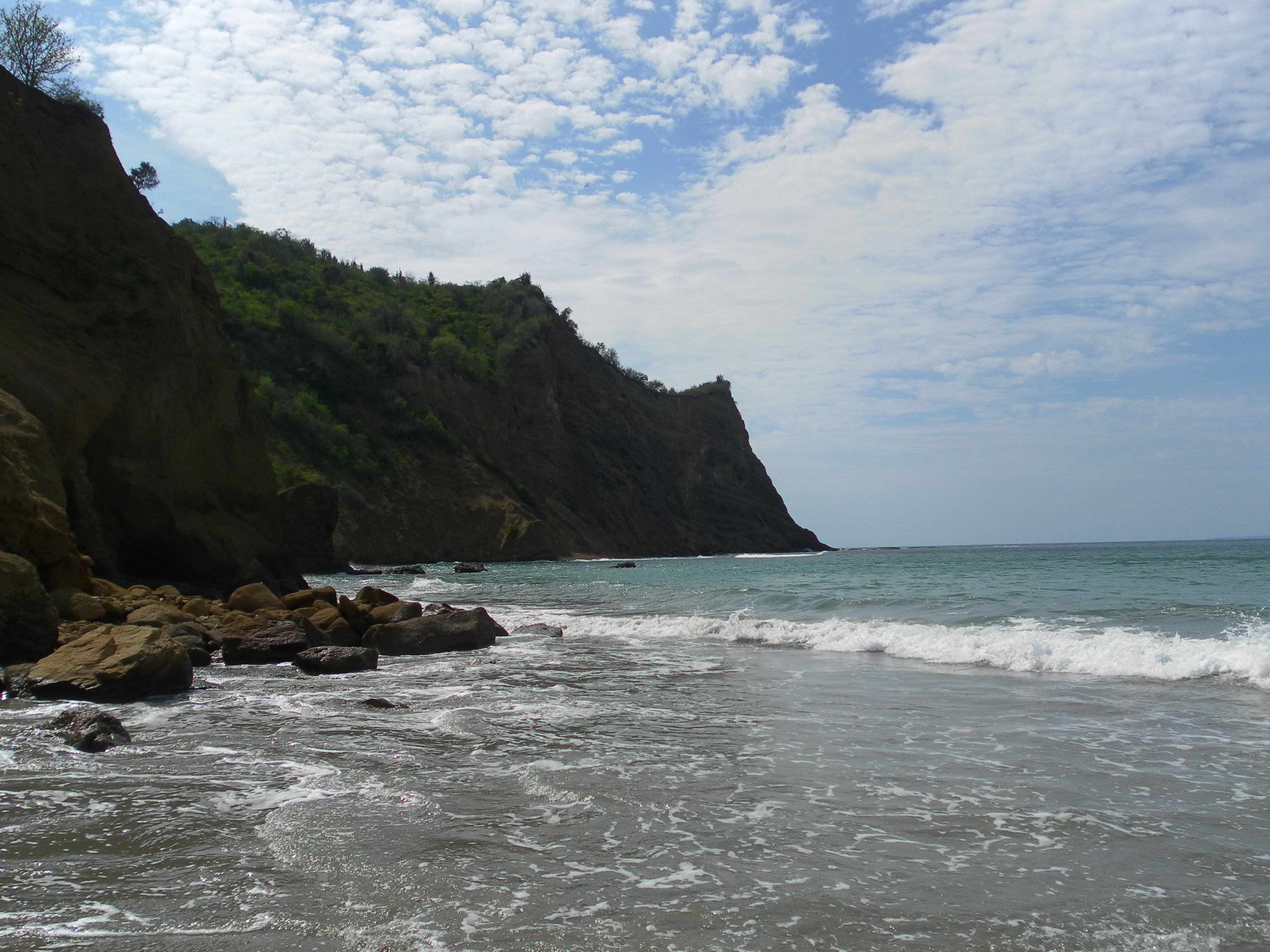 Playa Los Frailes, en el Parque Nacional Machalilla. Ecuador.